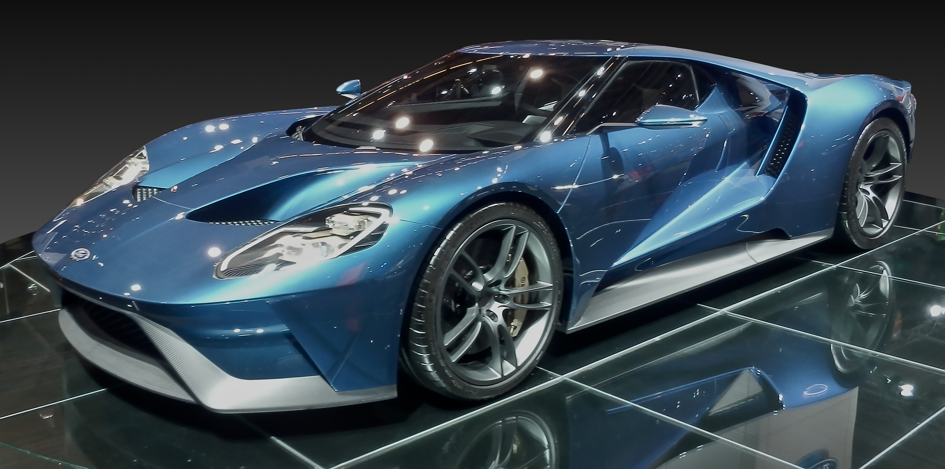 Ford GT at IAA 2015